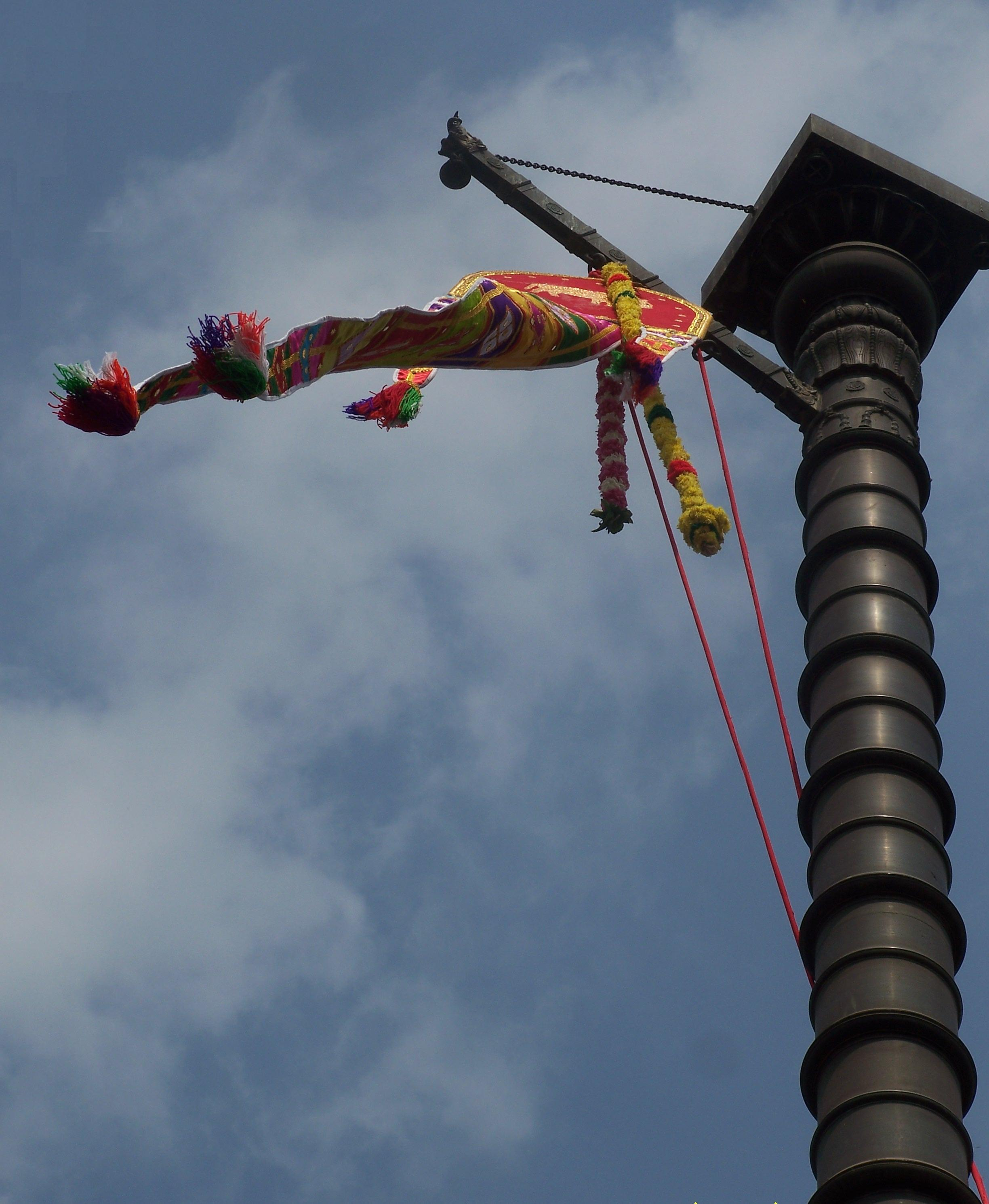 തിരുവാഴപ്പള്ളിയിലെ മഹാദേവനടയിലെ കൊടിമരം-ഉത്സവനാളിൽ